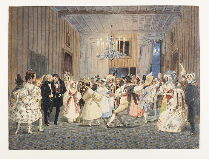 hos Puggaard i via Avignonese 8. februar 1836- Info